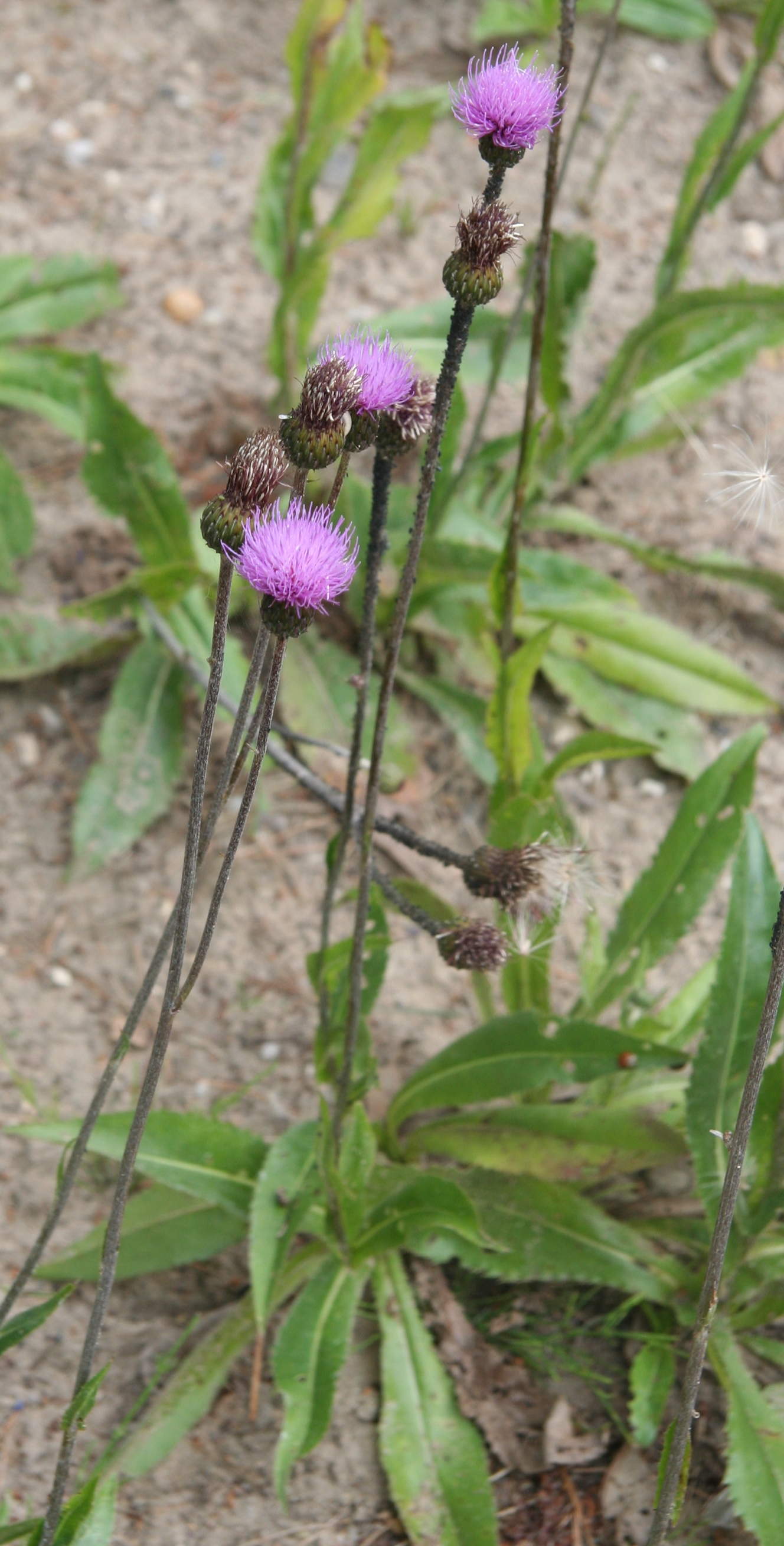 Cirsium pannonicum im Botanischen Garten Hamburg